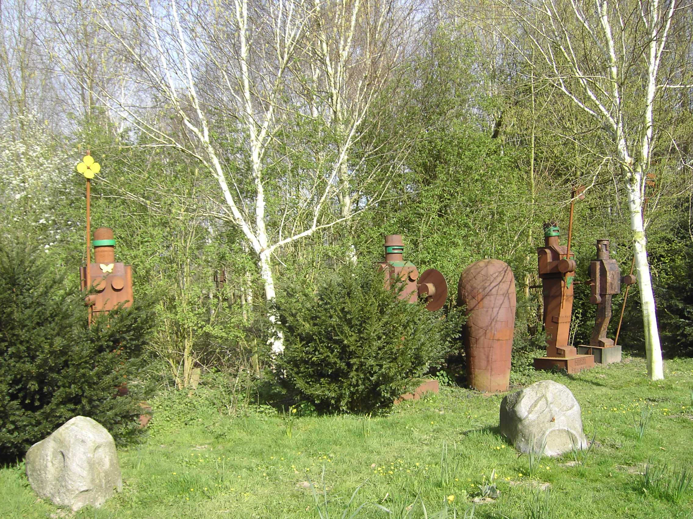 Anatol Herzfeld, Arbeiten in Hombroich